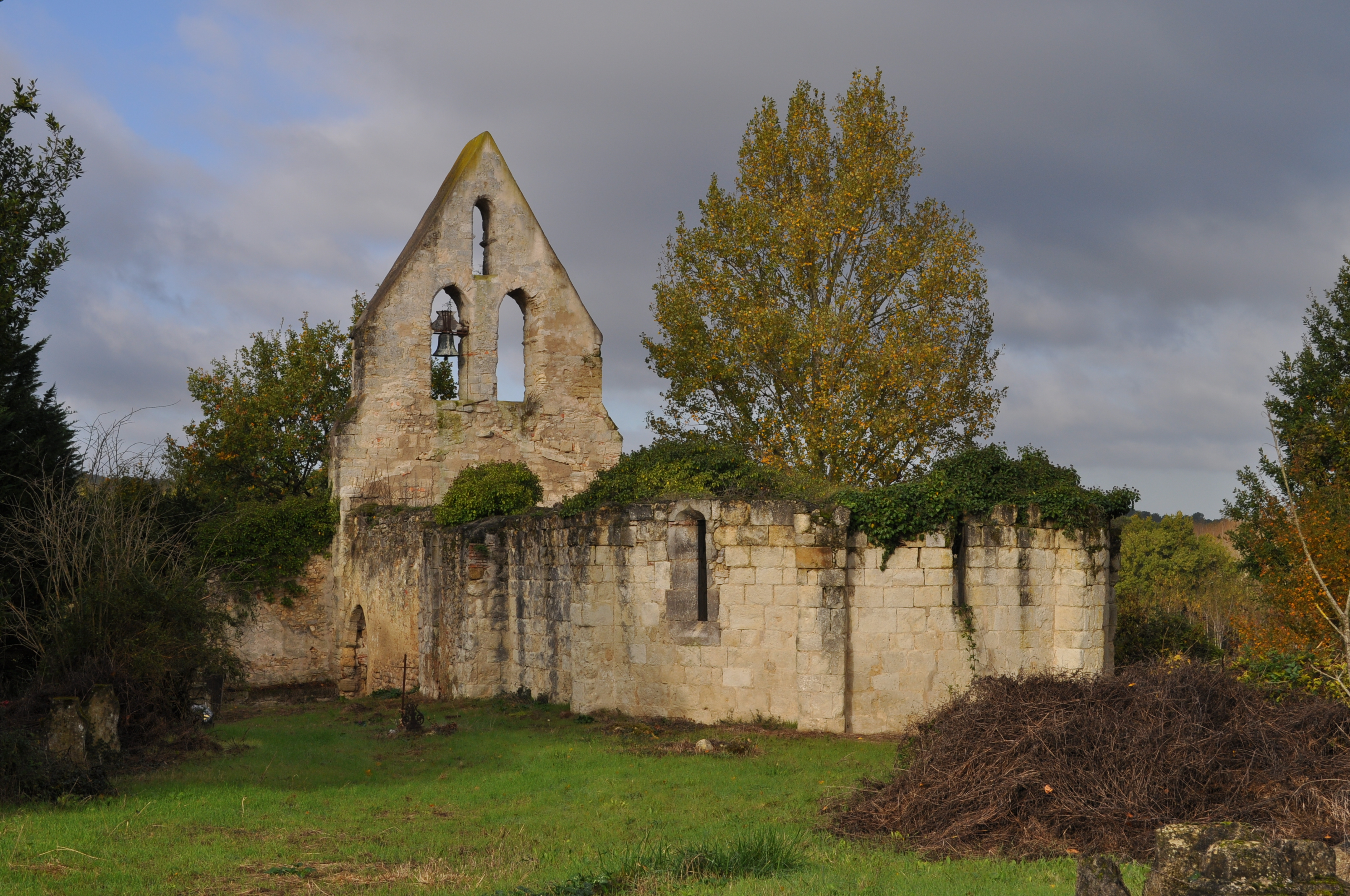 Vista desde el Este